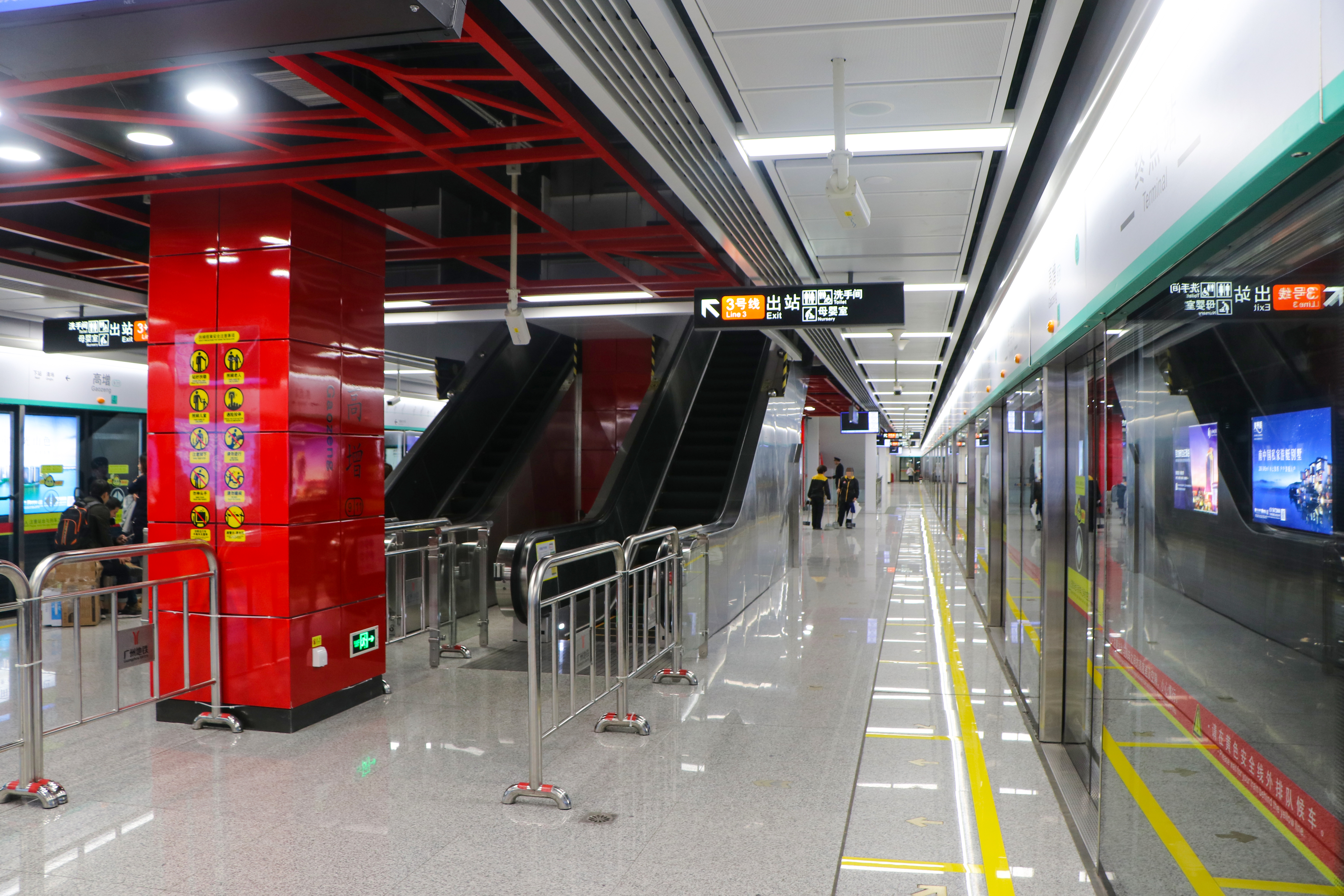 广州地铁高增站